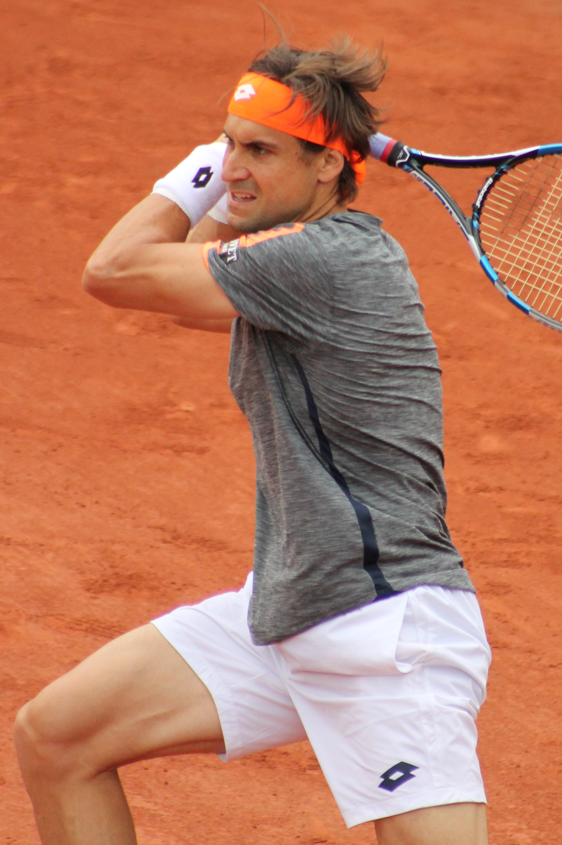 Ferrer RG16 (44)